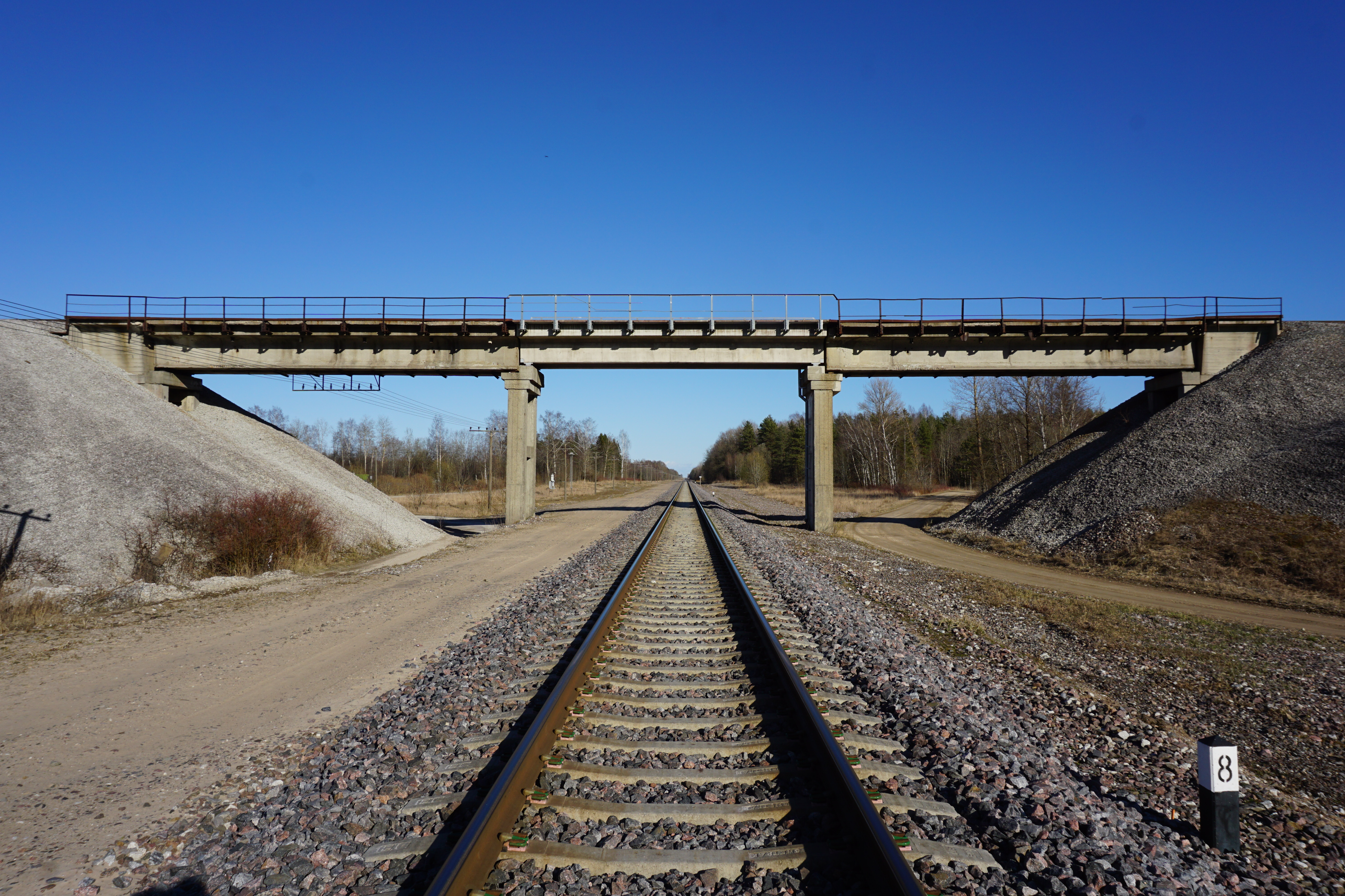 Tapa-Narva raudtee ja raudteesild. Eesti ainus raudteesild üle teise raudtee. Silla all asuv raudtee suundub Tallinnast Narva. Sillal kulgev raudtee suundub Kohtla-Järvelt Ahtmesse ja sealt omakorda edasi teistesse Põlevkivi Raudtee tööstuspiirkondadesse. Silla lähedal asub Kohtla raudteejaam.